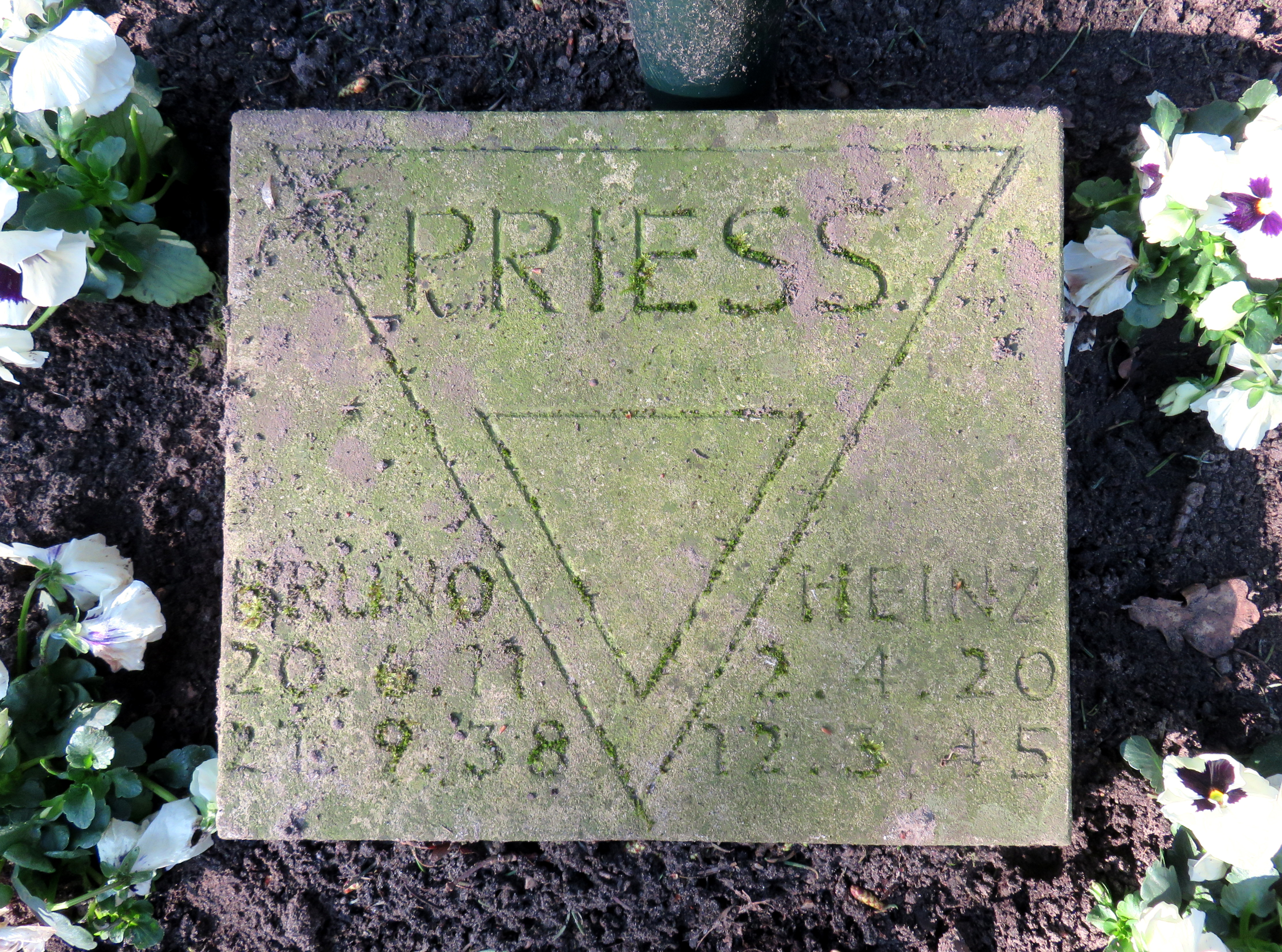 Kissenstein für die deutschen Widerstandskämpfer Bruno und Heinz Priess im Ehrenhain Hamburgischer Widerstandskämpfer, Friedhof Ohlsdorf, Planquadrat K 5 (Bergstraße gegenüber dem Museum).